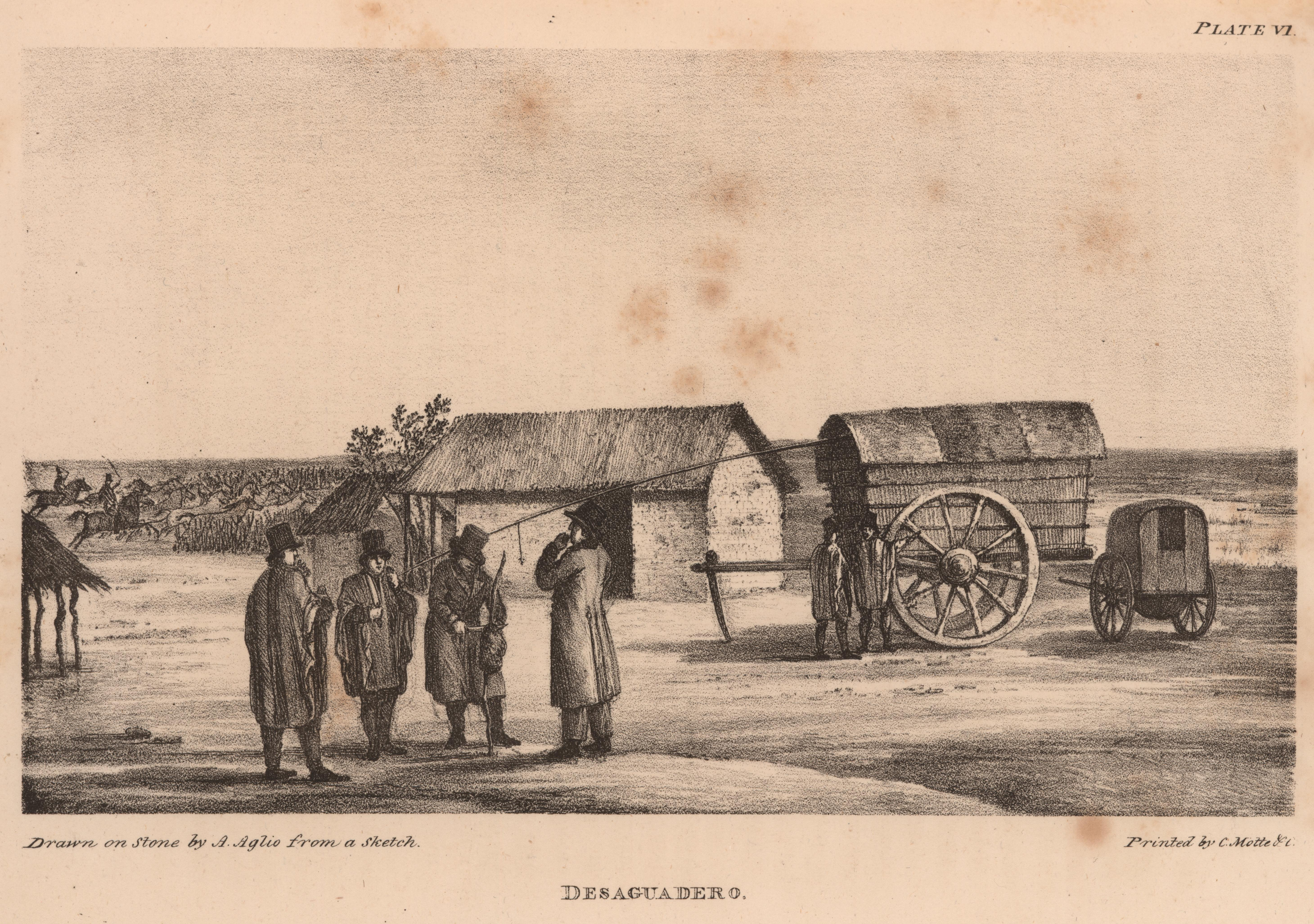 Desaguadero, junto a la casa de postas a principios del siglo XIX. Litografía de Agostino Aglio según dibujo (de quién es este último, no se dice); impresa por C. Motte & Cº y publicada en el libro del viajero y filántropo inglés Peter Schmidtmeyer Travels into Chile, over the Andes, in the years 1820 and 1821, London: Longman, Hurst, Rees, Orme, Brown and Green, 1824.